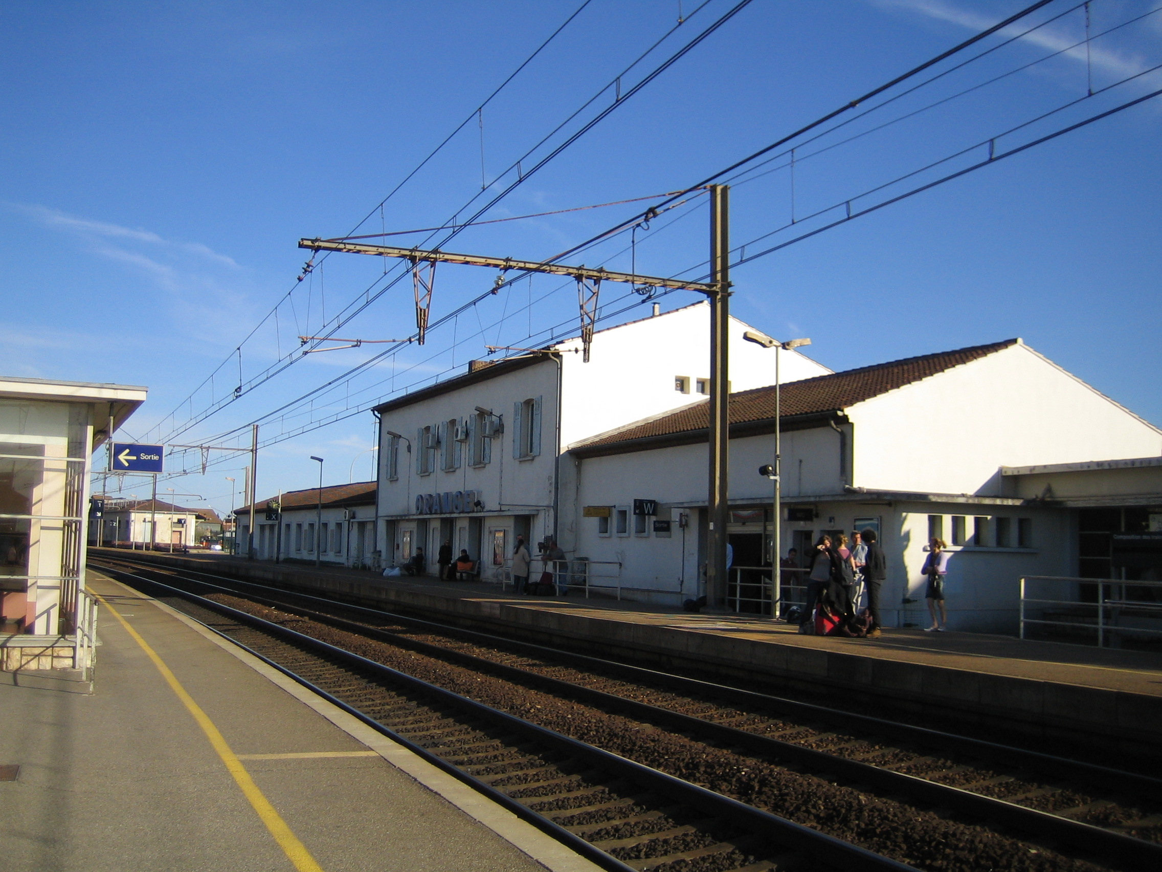 Vue du quai et de la Gare d'Orange dans le Vaucluse, France.